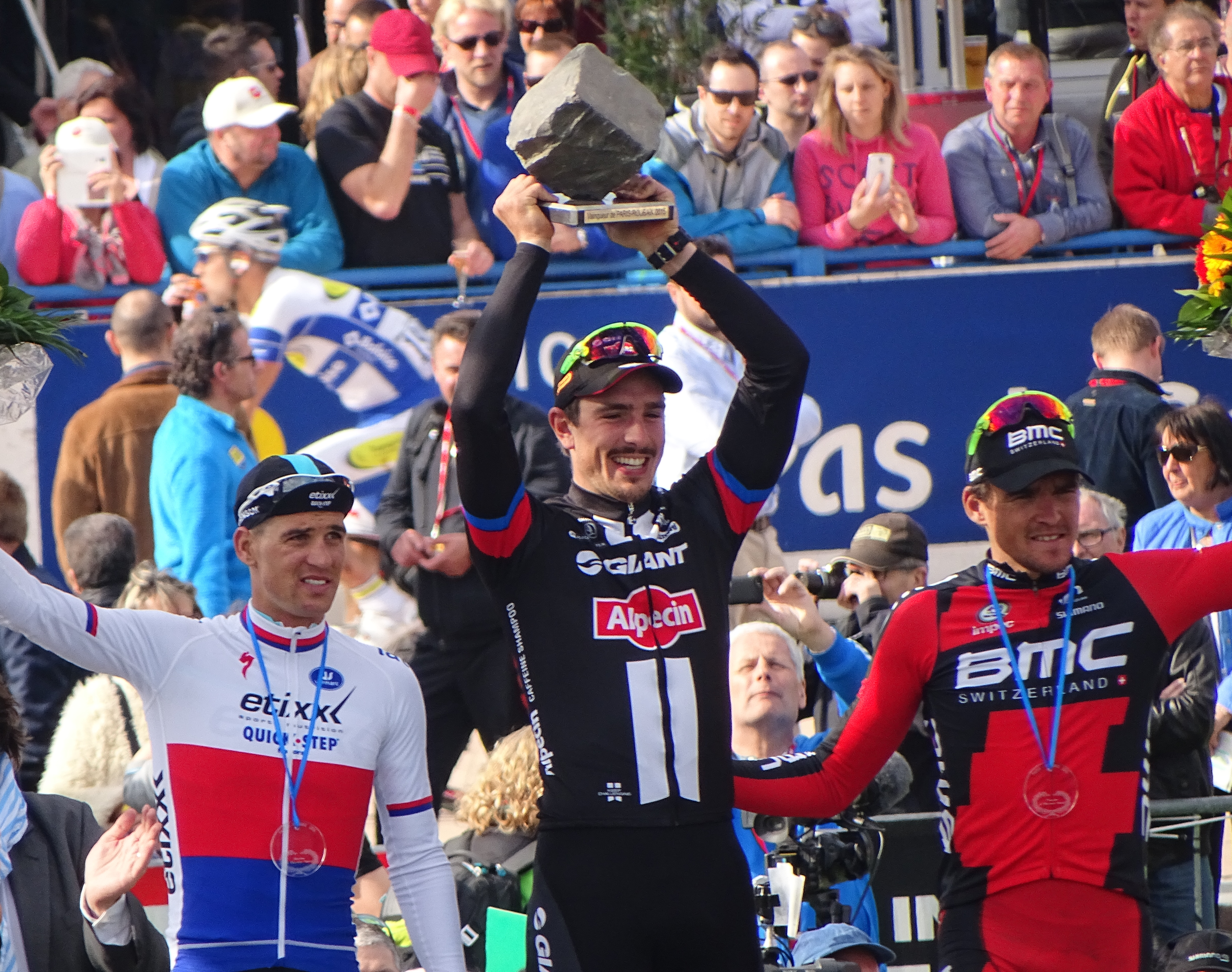 Reportage réalisé le dimanche 12 avril à l'occasion de l'arrivée du Paris-Roubaix 2015 à Roubaix, France.